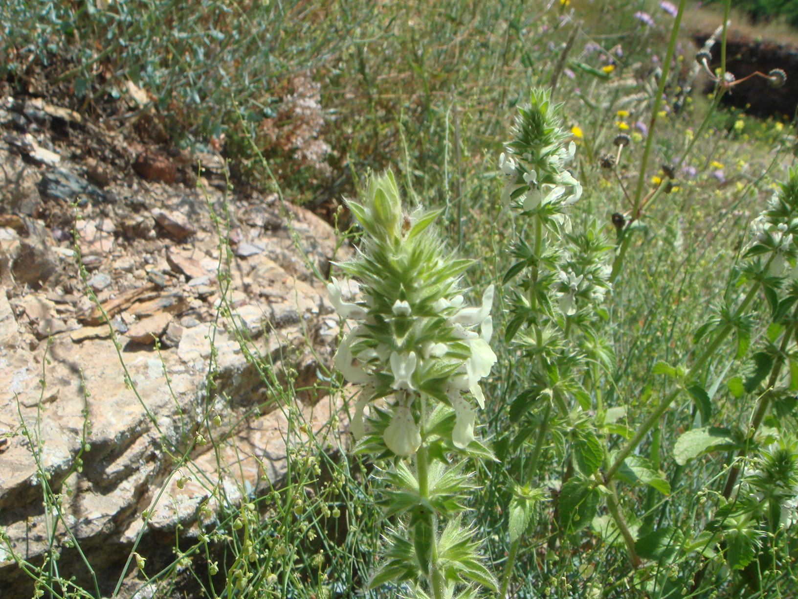 Stachys ocymastrum Almonaster, Huelva, España